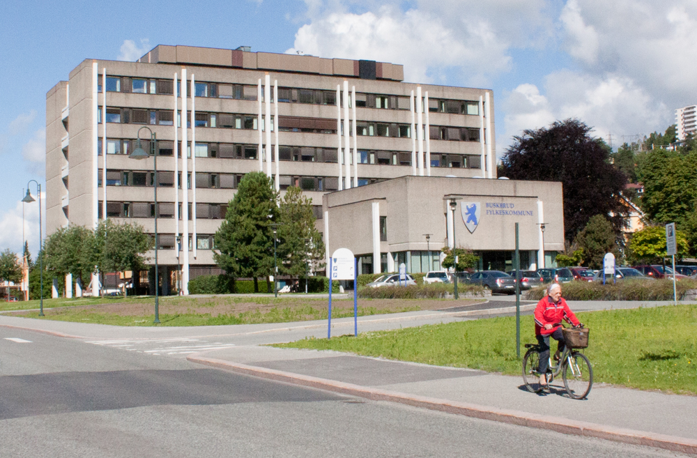 Fylkeshuset i Drammen 2013.